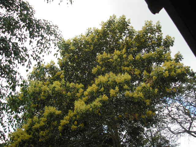 Tachigali paniculata (Carvoeiro), município de Bonfinópolis de Minas, Minas Gerais, Brasil. Autor: Denis A. C. Conrado